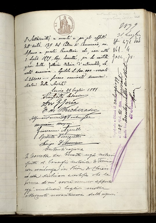 Atto di autenticazione delle firme degli amministratori - Lodovico Scarfiotti, Cesare Goria Gatti, Emanuele Cacherano di Bricherasio, Alfonso Ferrero di Ventimiglia, Michele Ceriana Mayneri, Giovanni Agnelli, Roberto Biscaretti di Ruffia, Luigi Damevino - della Fabbrica italiana d'automobili Società anonima, presso il Tribunale di Commercio di Torino 29 luglio 1899. L'atto costitutivo della società Fiat fu rogato dal notaio Ernesto Torretta in Torino il 2 luglio 1899 (AS Torino, Fondo Tribunale civile e penale di Torino, Atti di Società, vol. 4, fasc. 70)